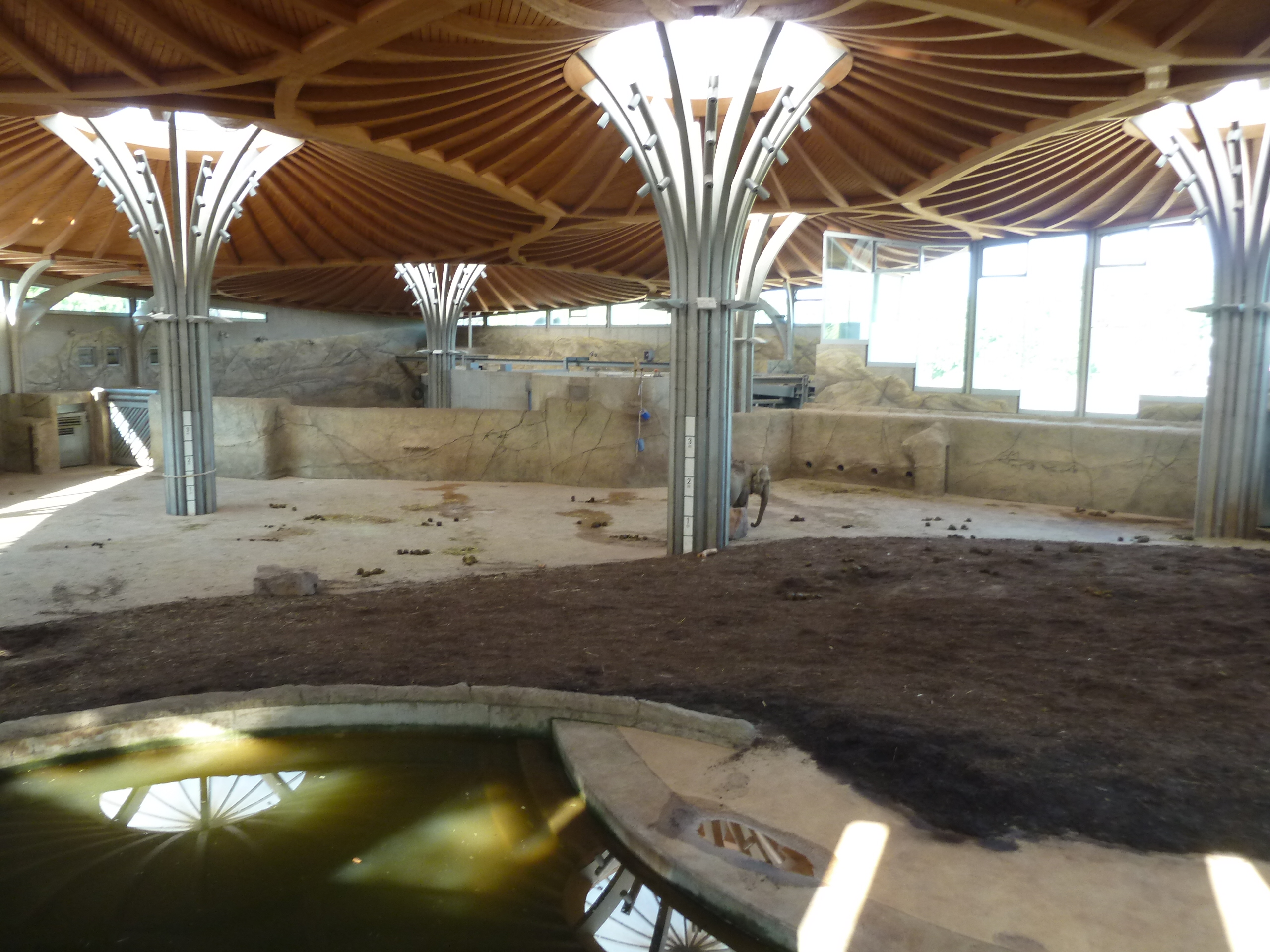 Elefantenpark Köln